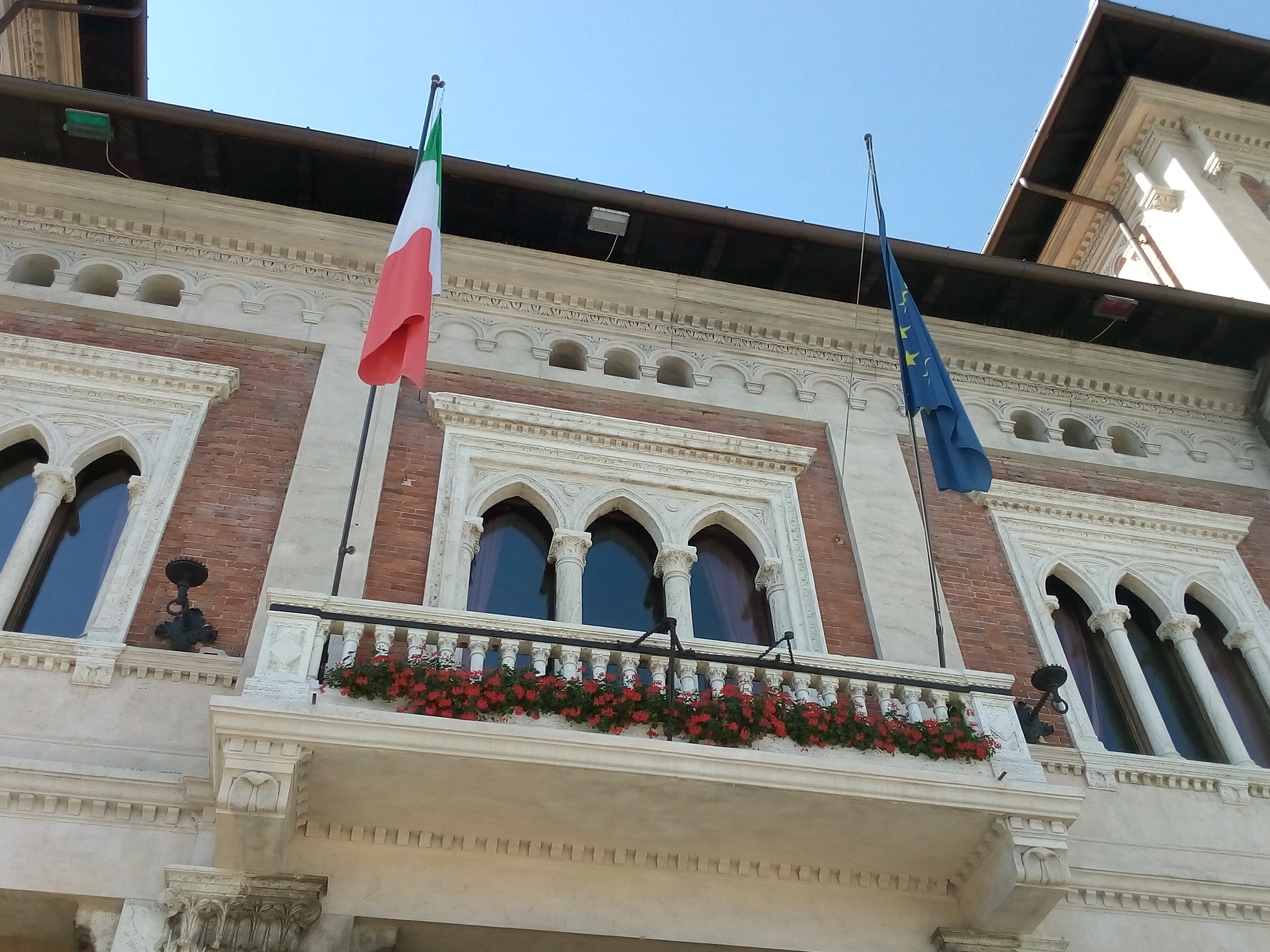 Dettaglio del palazzo municipale di Avezzano, Abruzzo